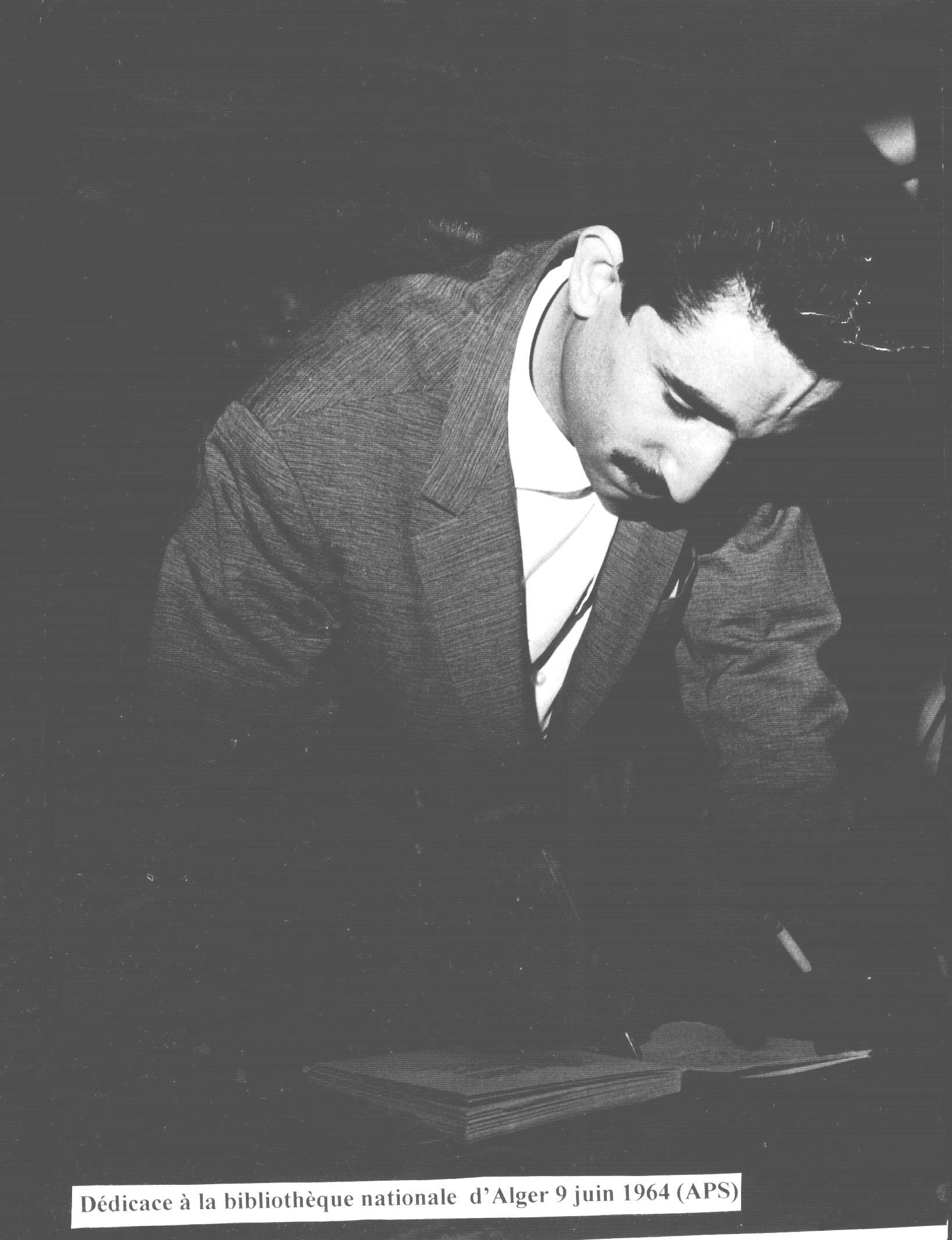 Kaddour M'Hamsadji signant son livre La Dévoilée en juin 1964.